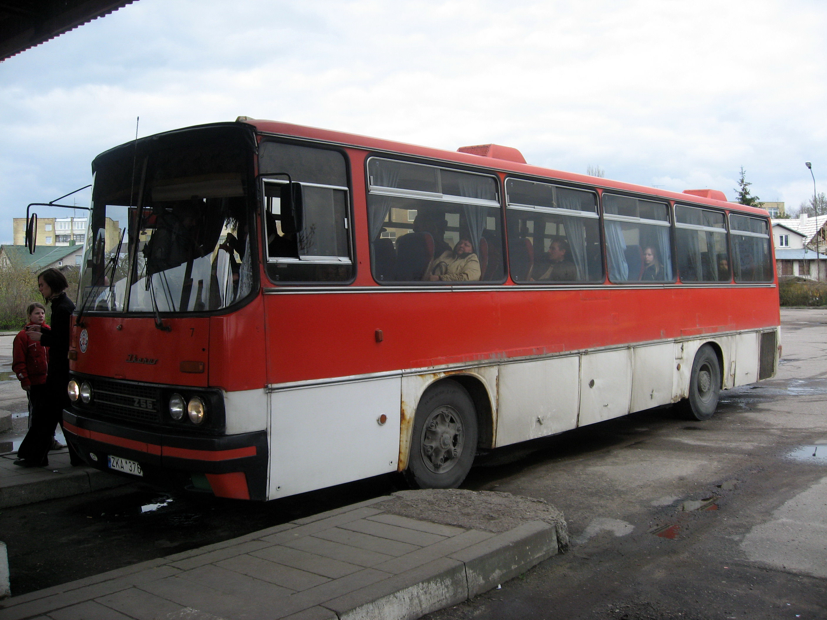 Ikarus 256 ve Vilniusu